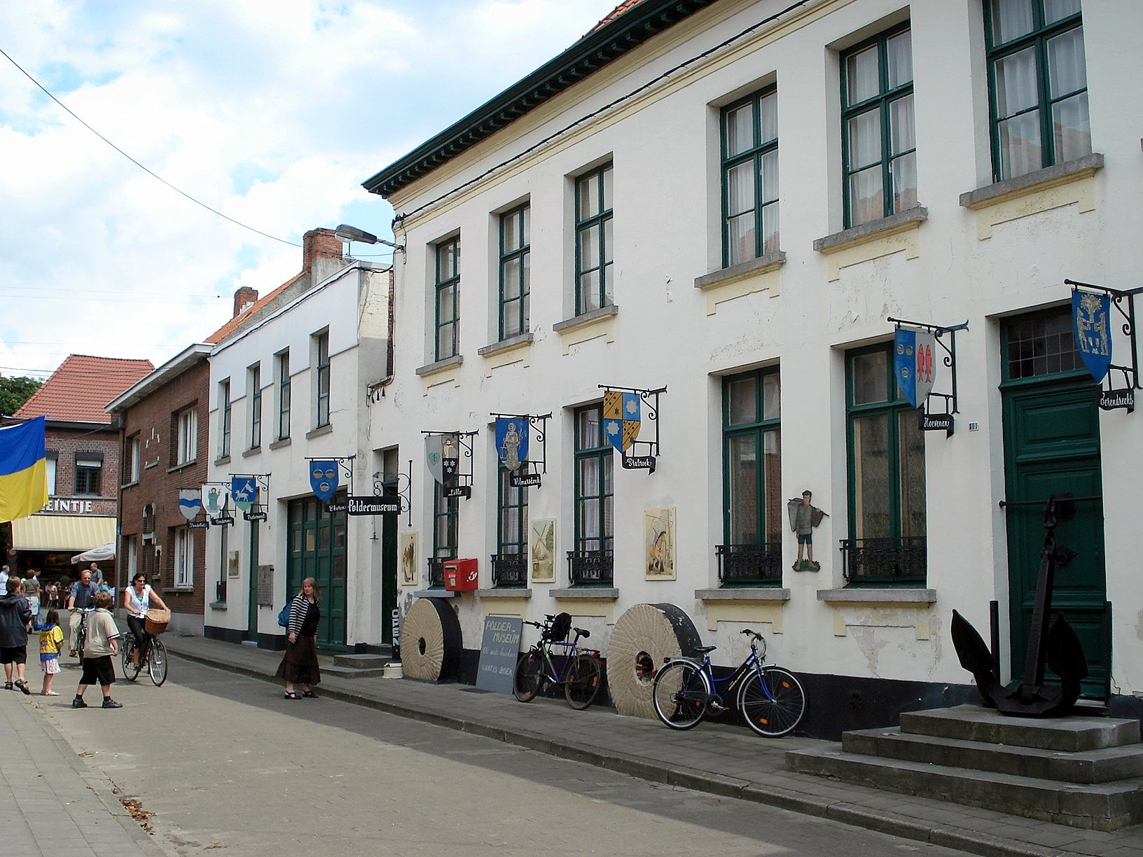 Lillo (Anvers, Belgique): Poldermuseum, Tolhuisstraat